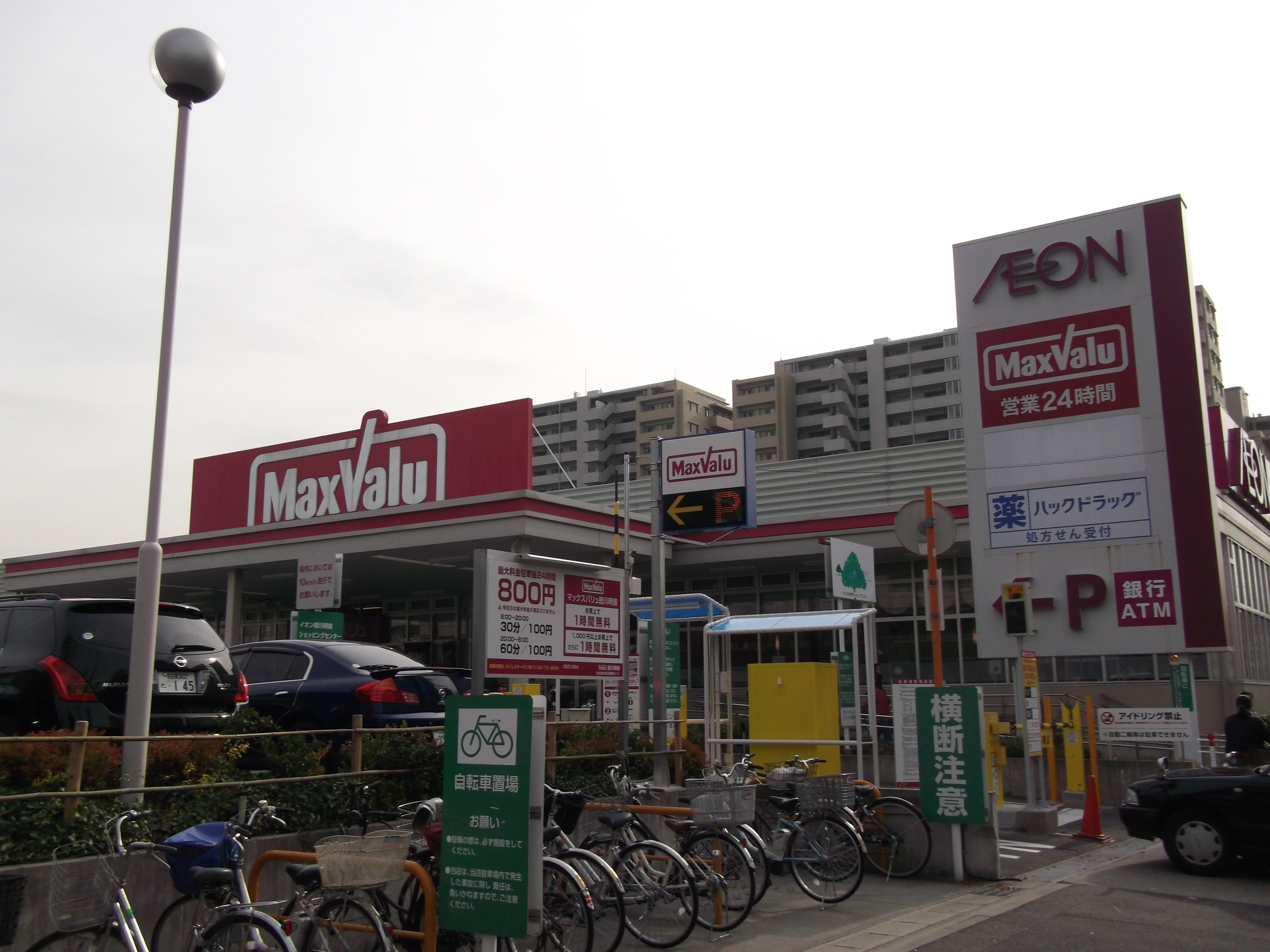 名古屋市東区明倫町にあるイオン徳川明倫ショッピングセンターを西側から写す